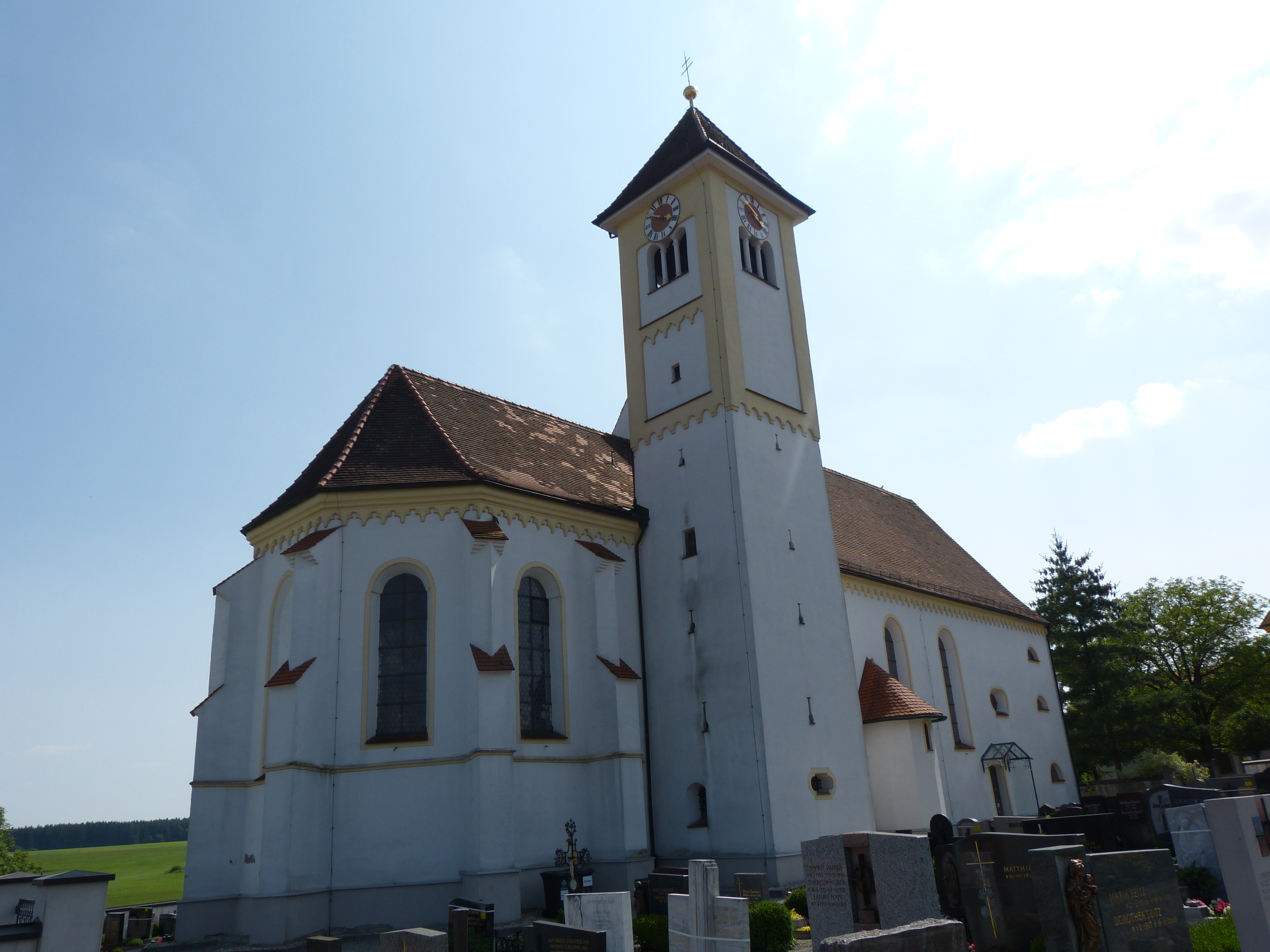 Mariä Himmelfahrt, Markt Wald, Landkreis Unterallgäu, Bayern, Deutschland